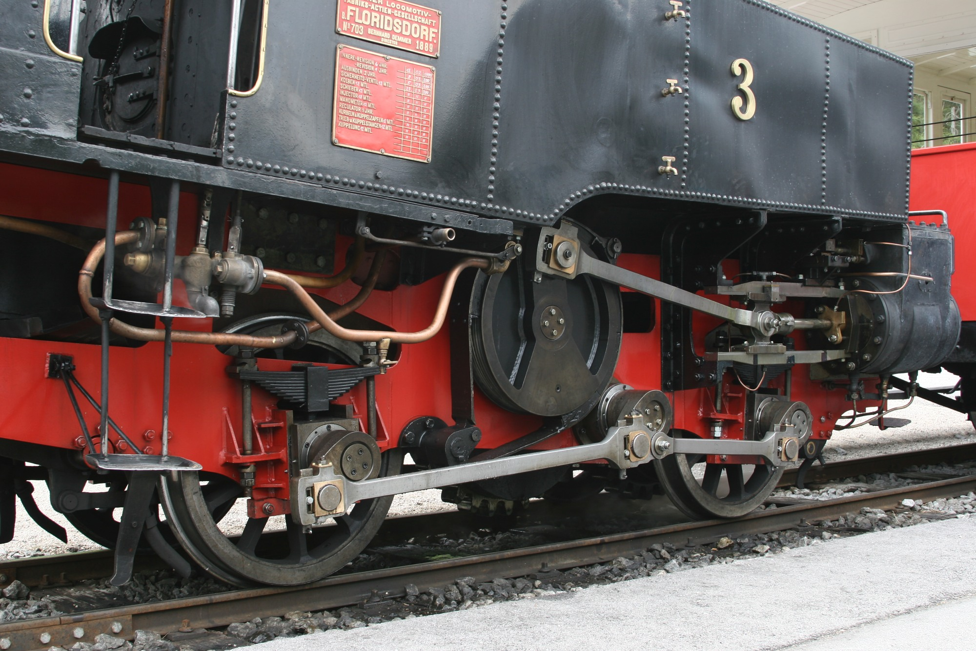 en: Detail view of Achenseebahn cog railway engine No. 3 de: Detailansicht der Achenseebahn-Lokomotive No. 3